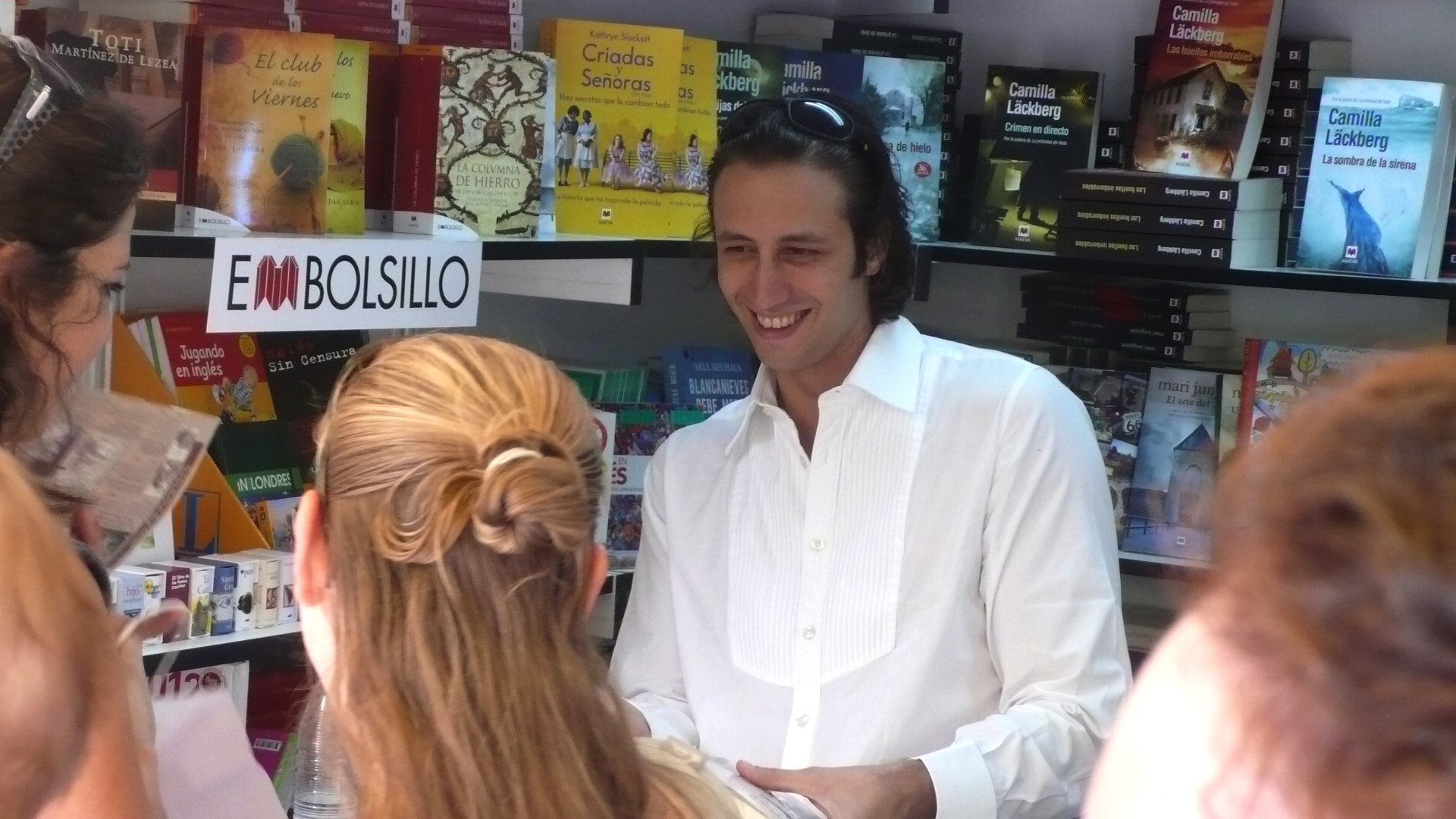 Saúl Cepeda Lezcano firmando ejemplares del libro Delitos para llevar en la Feria del Libro de Madrid 2012